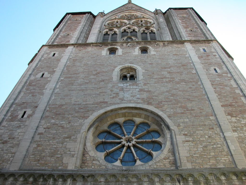 Braunschweig: Braunschweiger Dom: Westwerk